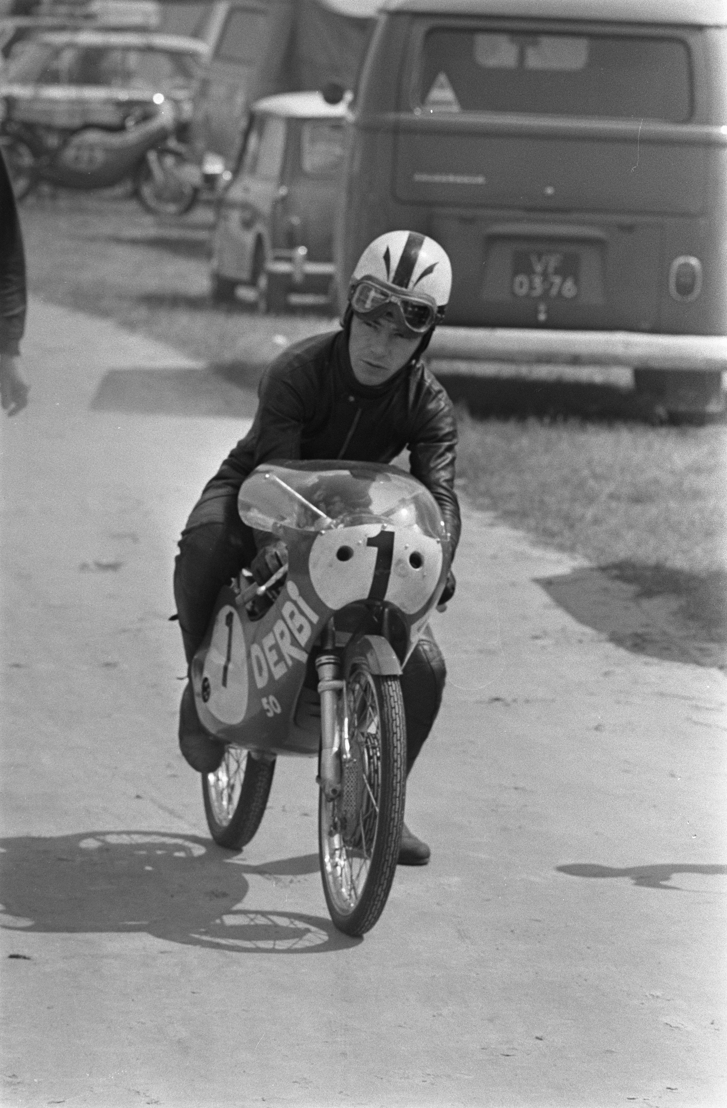 Collectie / Archief : Fotocollectie Anefo Reportage / Serie : TT Assen 1970 Beschrijving : TT-races in Assen; training. Angel Nieto ( 50 cc ) Datum : 25 juni 1970 Locatie : Assen Trefwoorden : motorsport, races Persoonsnaam : Nieto, Angel Instellingsnaam : TT Fotograaf : Verhoeff, Bert / Anefo Auteursrechthebbende : Nationaal Archief Materiaalsoort : Negatief (zwart/wit) Nummer archiefinventaris : bekijk toegang 2.24.01.05 Bestanddeelnummer : 923-6219